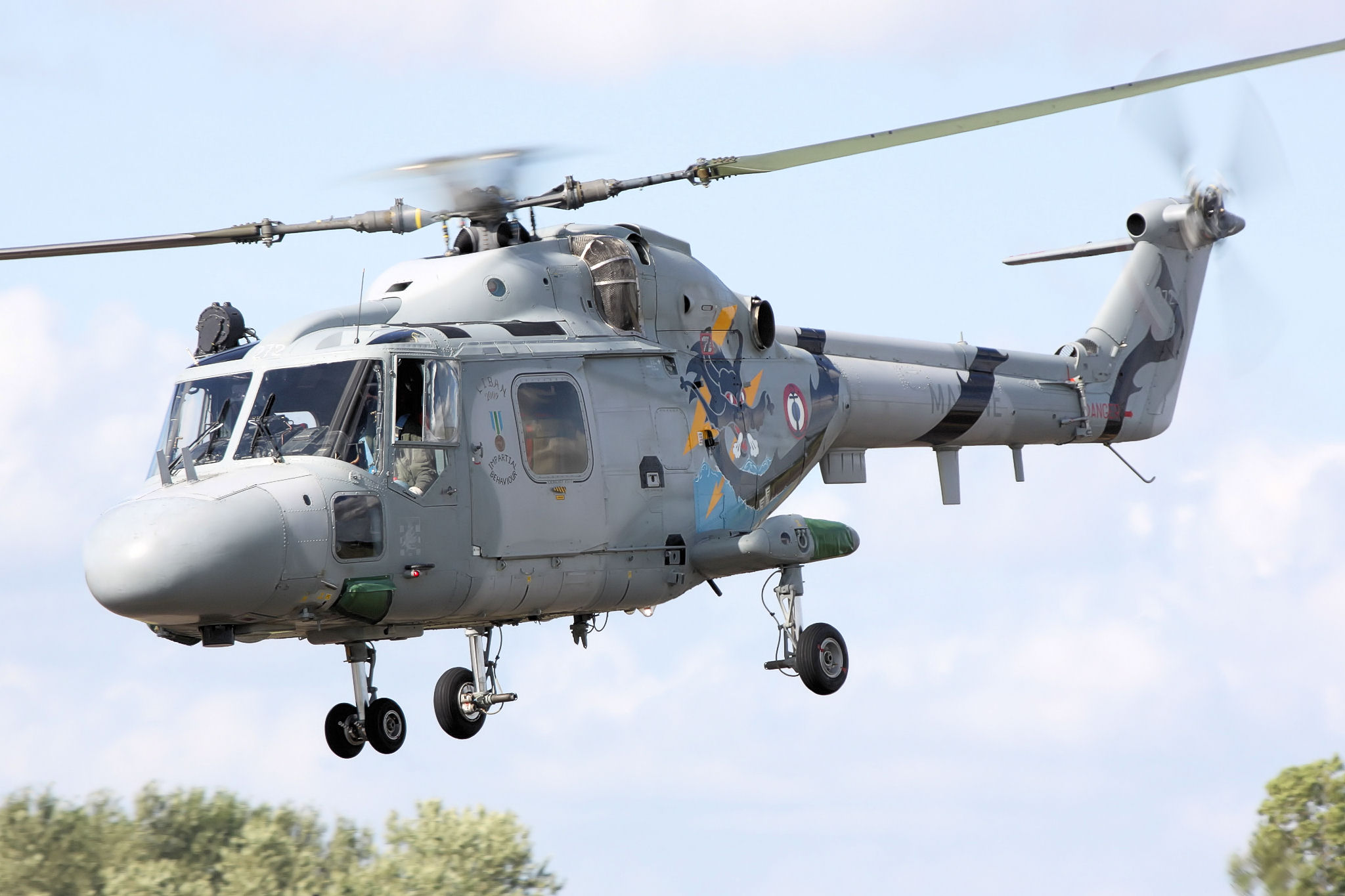 Lynx - RIAT 2009